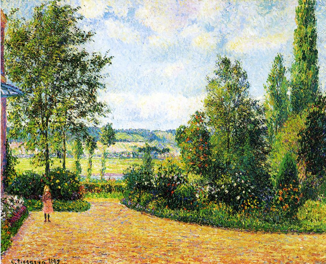 Toile de Camille Pissarro représentant le jardin d'Octave Mirbeau aus Damps (1891)